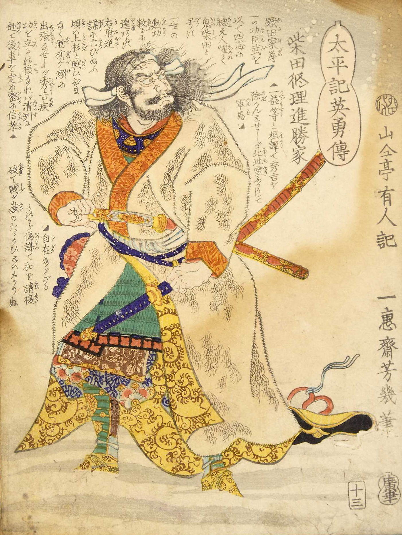 「太平記英勇伝十三：柴田修理進勝家」 1867年